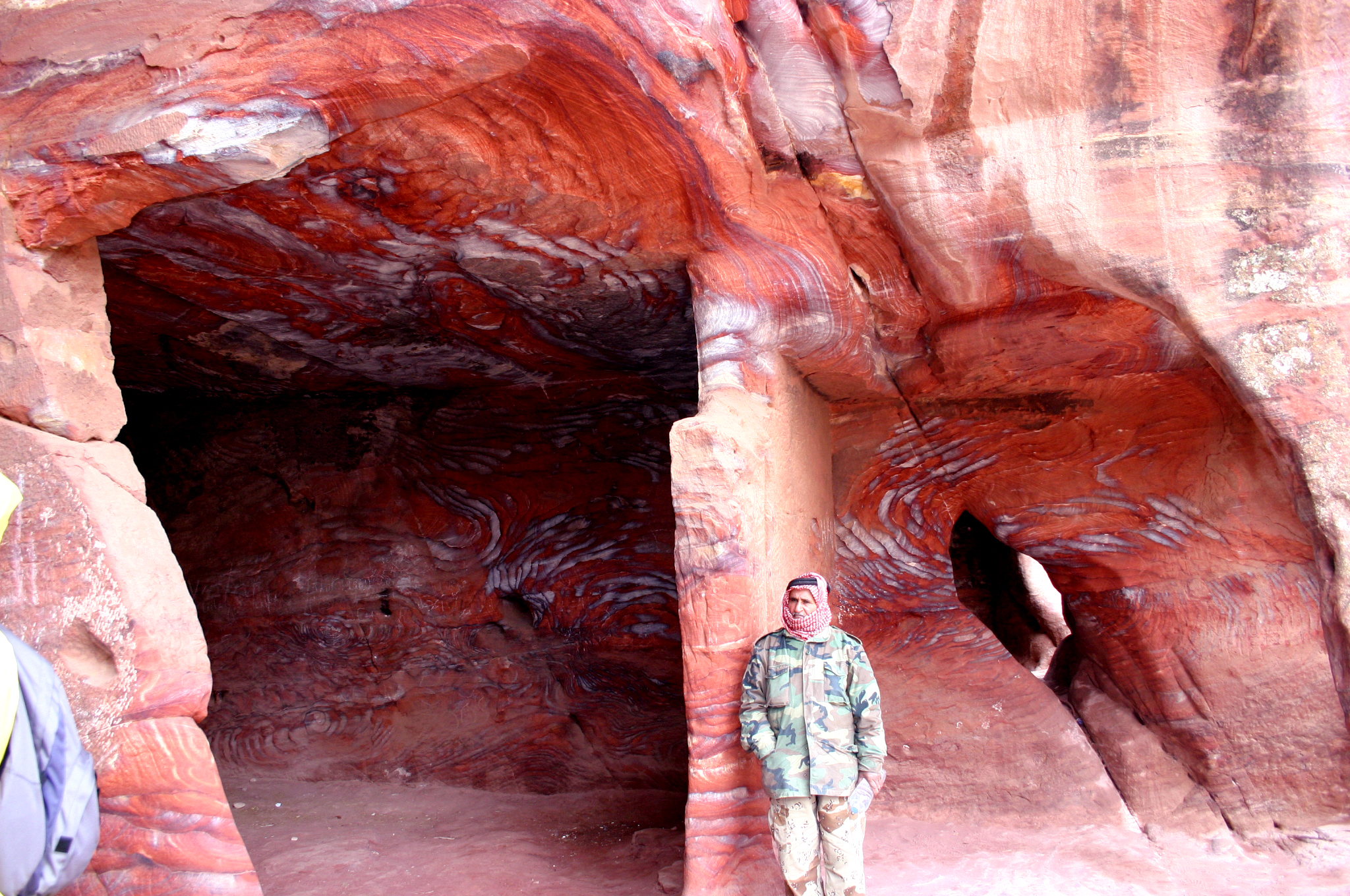 Petra, Jordan, 2004. Photo by Bertil Videt